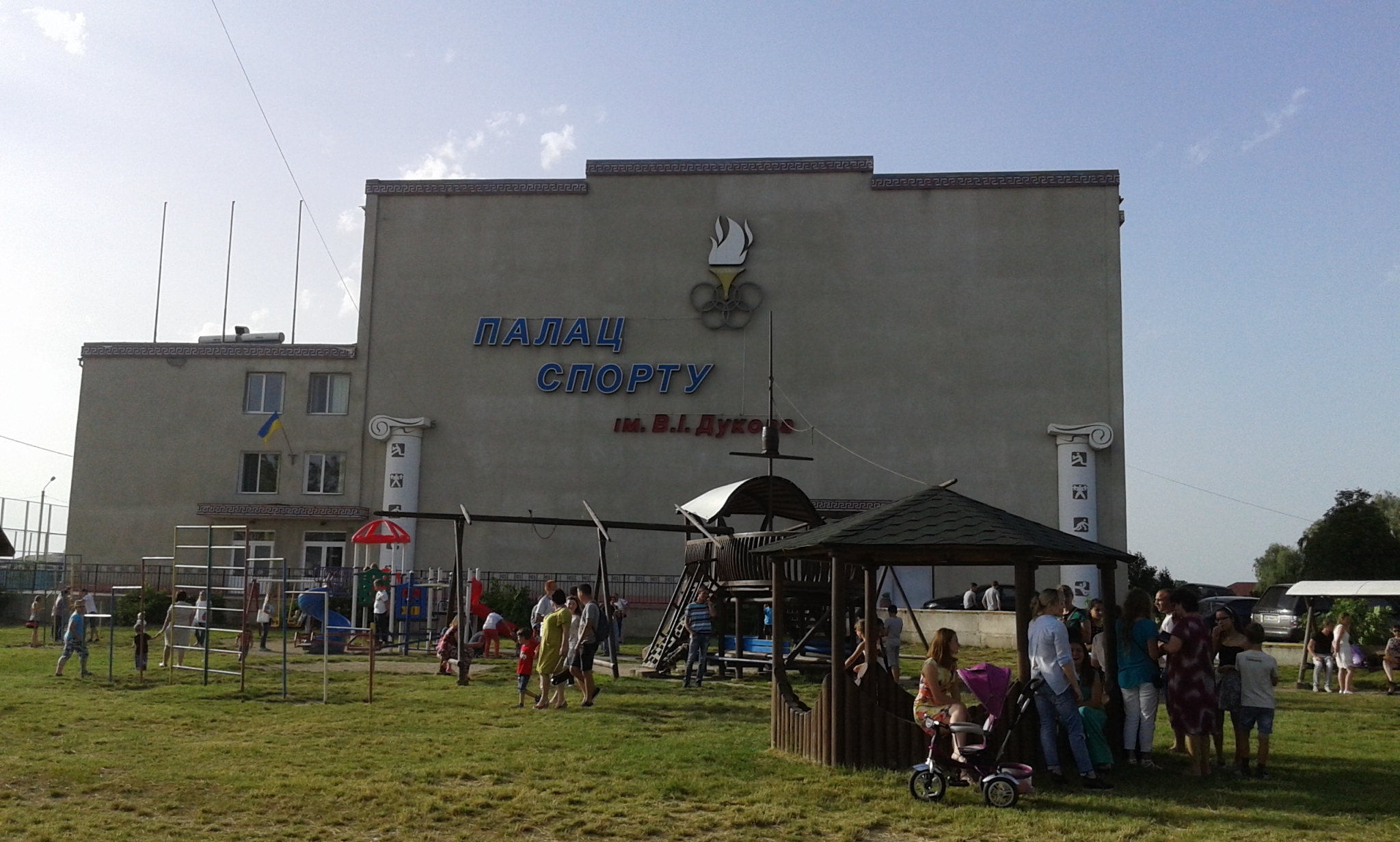 Палац спорту, Овідіополь